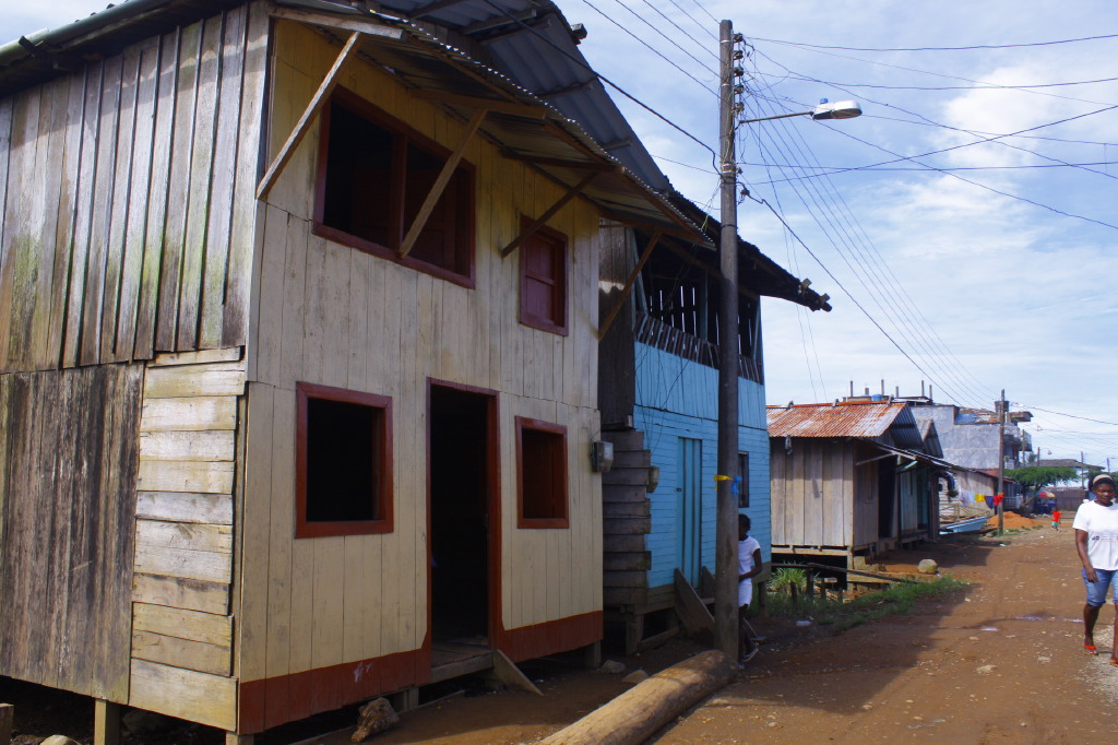 Calle de El Valle, Chocó.